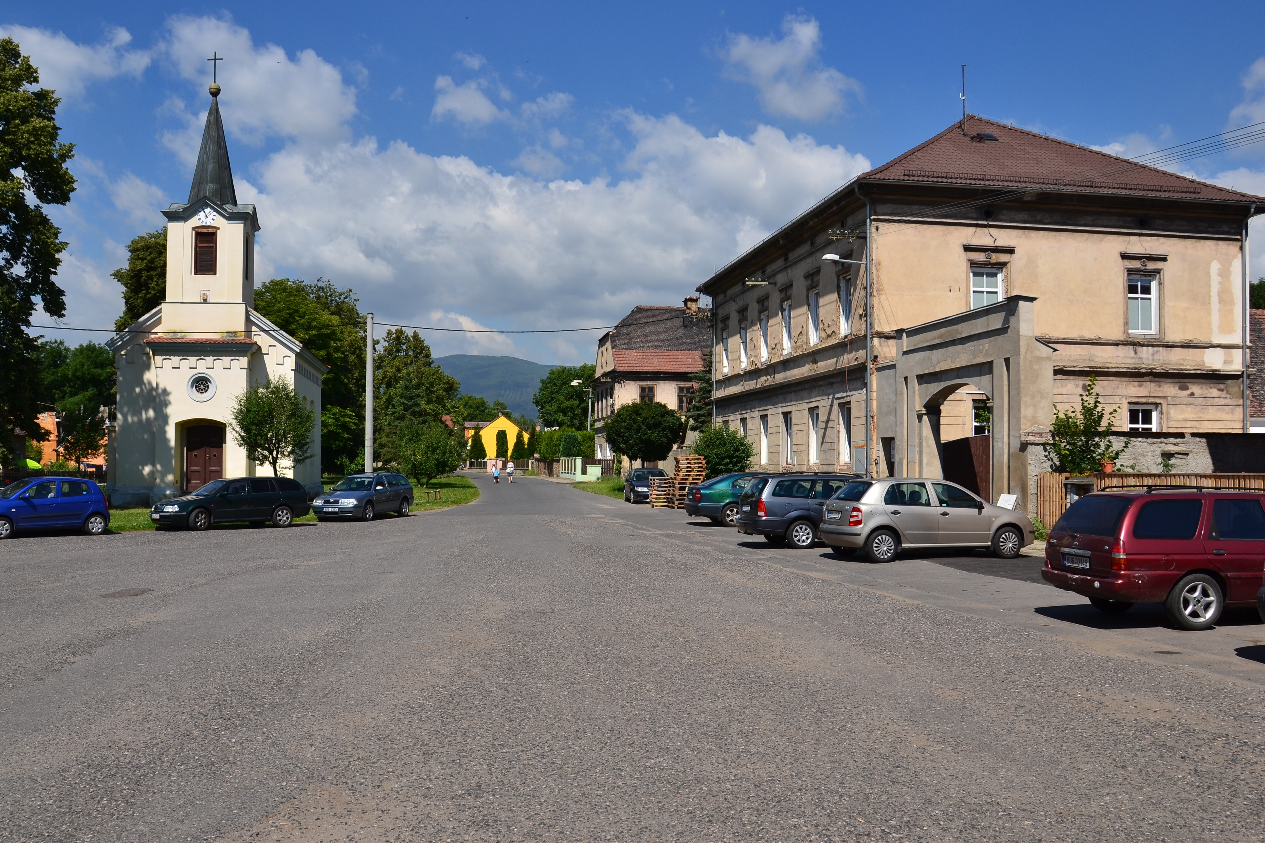 Náves kaplí